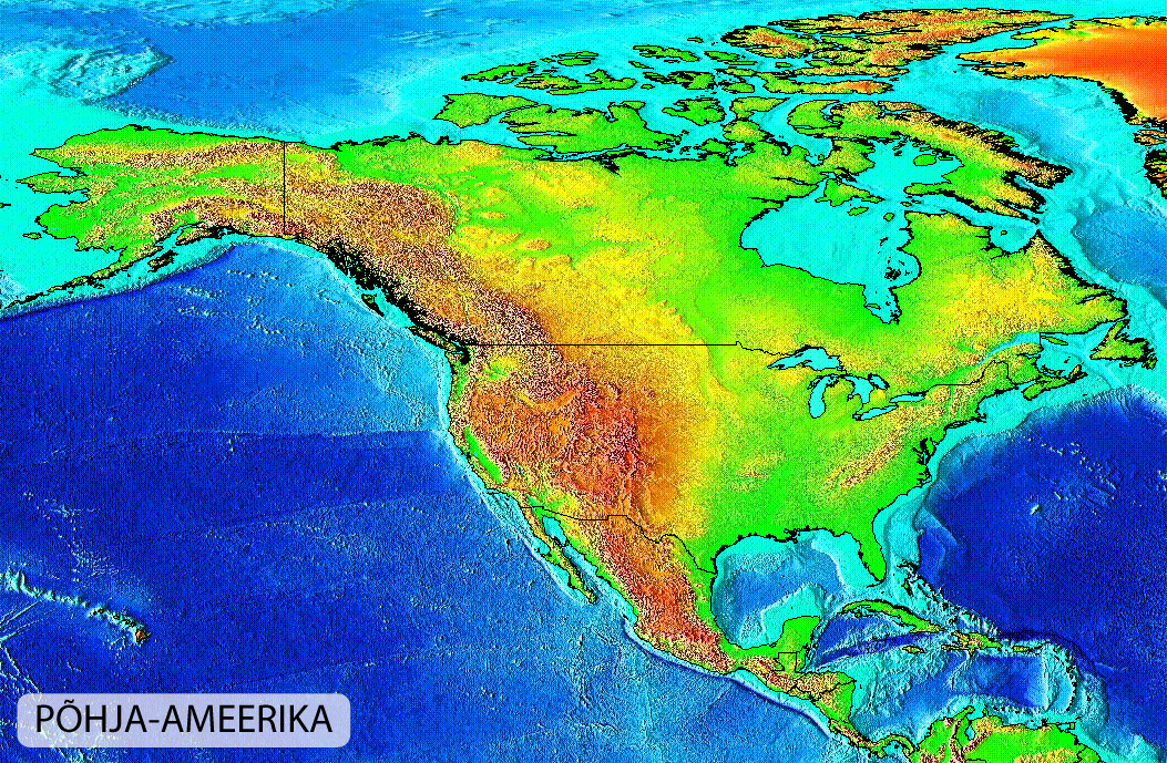 Põhja-Ameerika reljeef